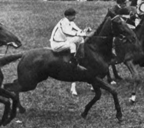 1920 Epsom Oaks winner, Charlebelle.